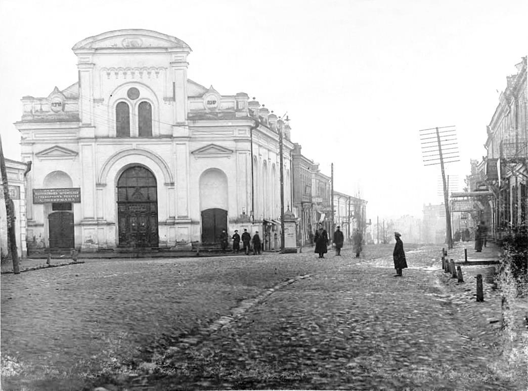 Бердичівська_Велика_хоральна_синагога_19_ст..jpg: Бердичівська Велика хоральна синагога у 19 столітті